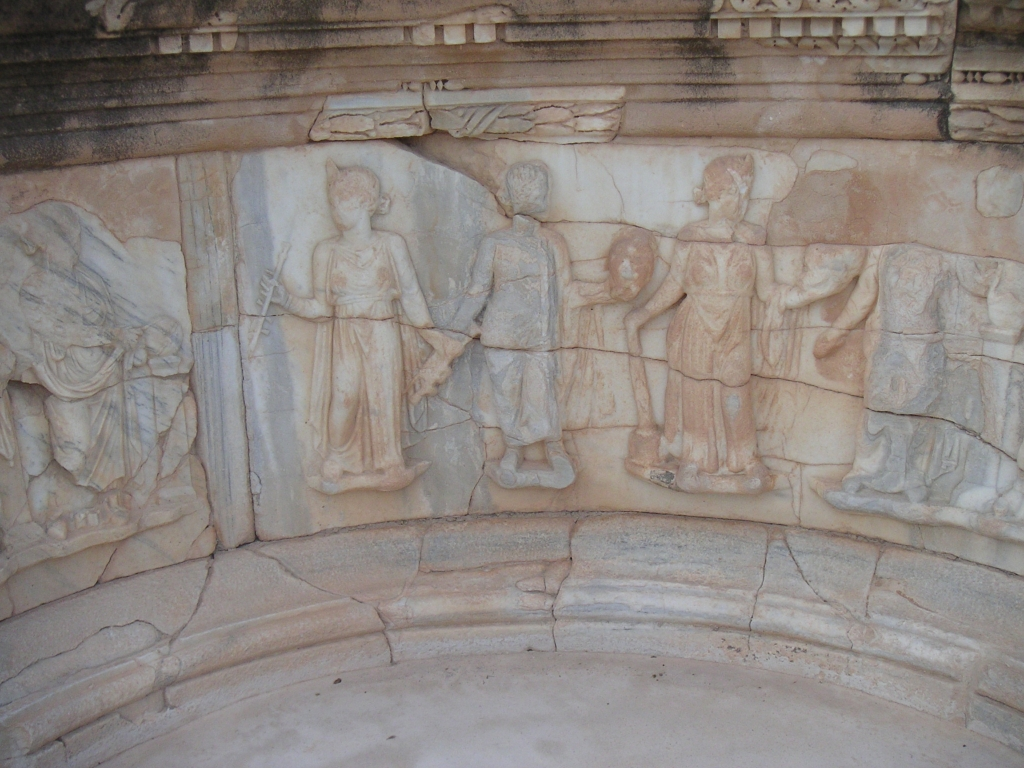 Théâtre de Sabratha, décoration du pulpitum : groupe des Muses, de gauche à droite : Polymnie, Euterpe tenant une flute double, Uranie, Thalie tenant un masque, Melpomène la main appuyée sur une massue